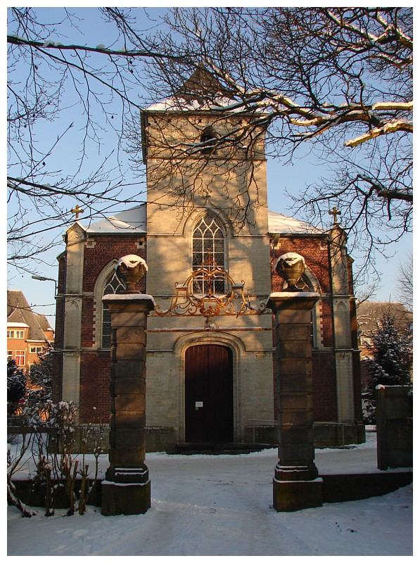 Parochiekerk Sint-Lambertus, Lovenjoel